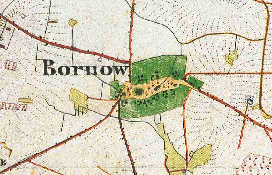 Bornow, Ortsteil der Stadt Beeskow, Lkr. Oder-Spree, Brandenburg, Deutschland, Ausschnitt aus dem Urmesstischblatt 3851 Beeskow von 1846